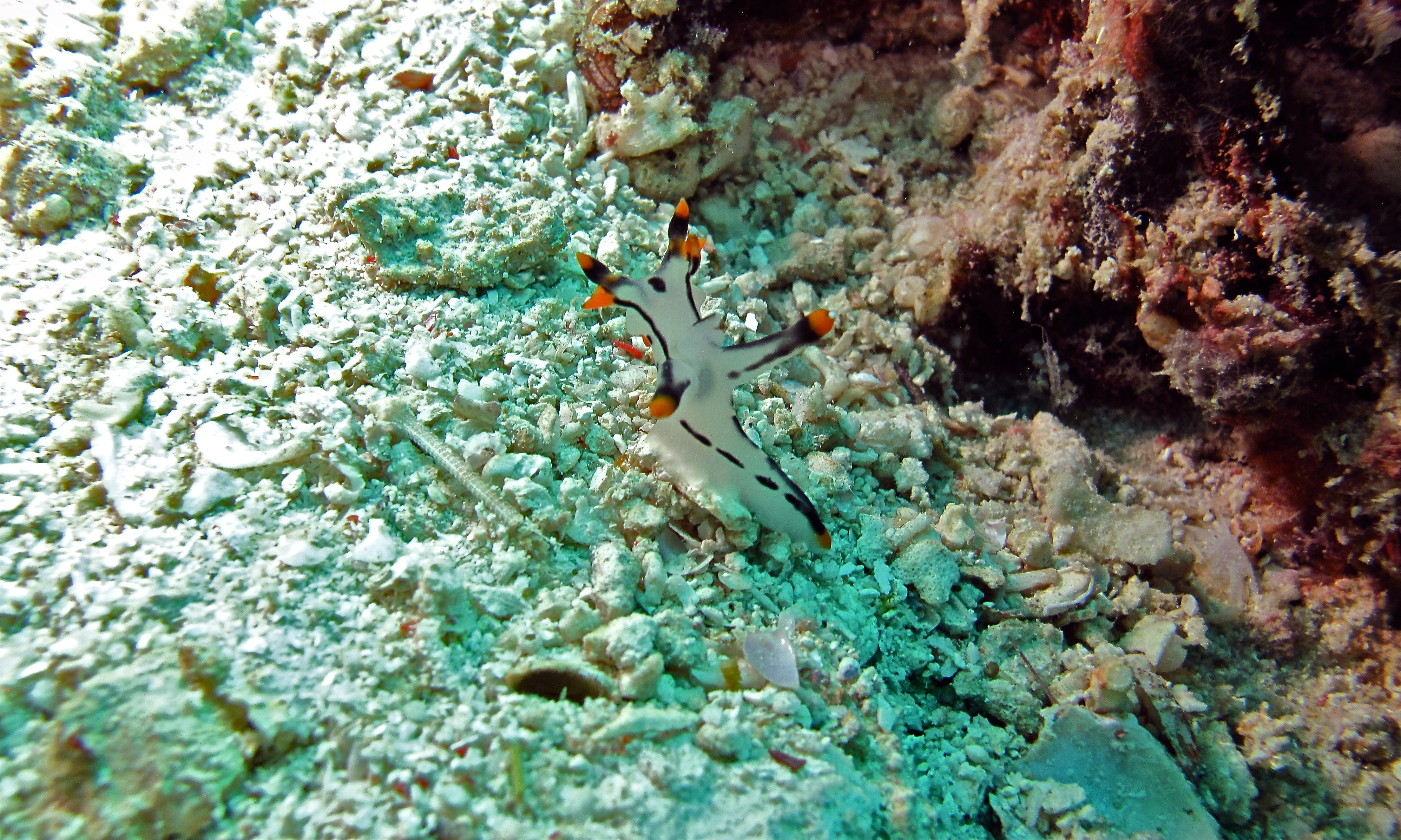 Lobster Wall, Pulau Mabul, Sabah, MALAYSIA